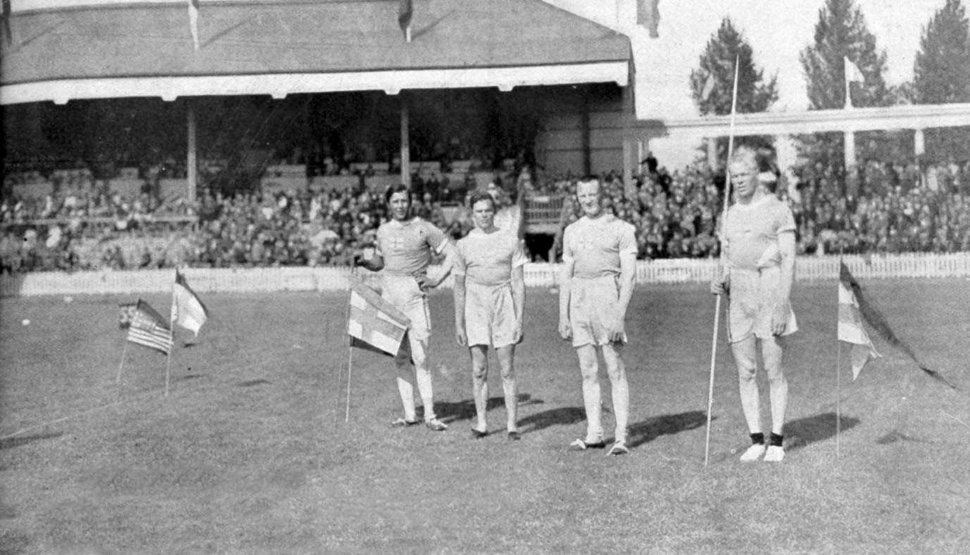 El Grafico del 14 de Enero de 1922. Edicion 133